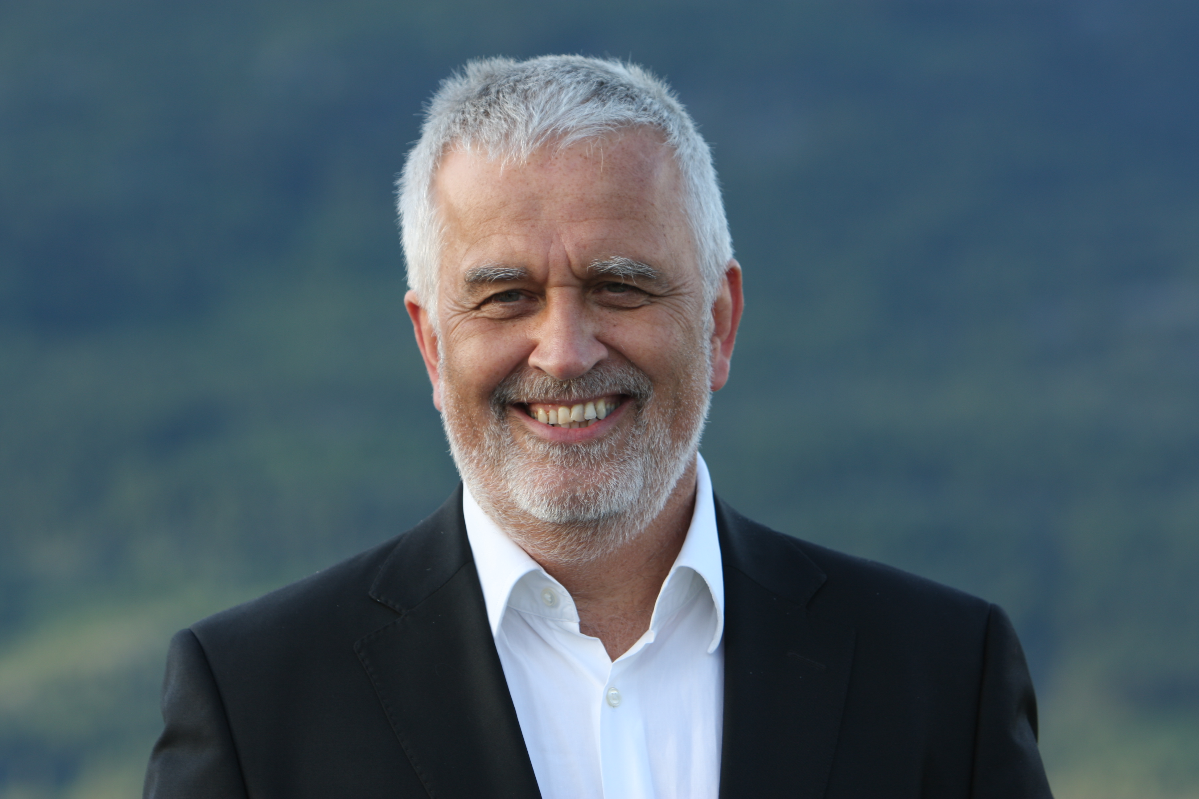 photo